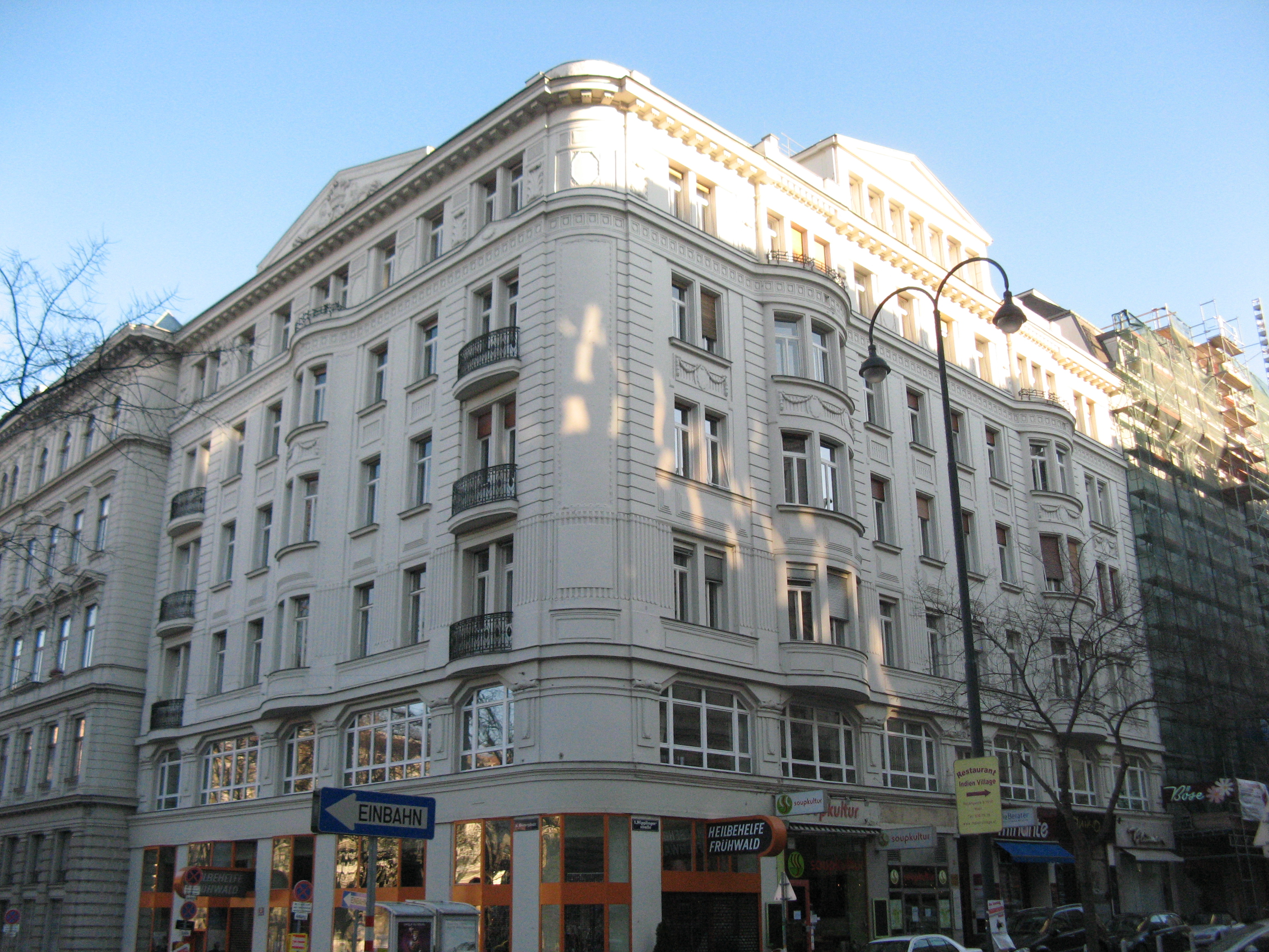 Haus Börseplatz Nr. 7 (1912) von Hans Schneider, Wien-Innere Stadt